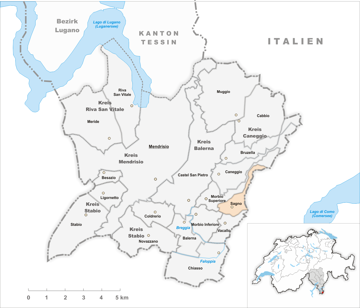 Municipality Sagno Artist: Tschubby